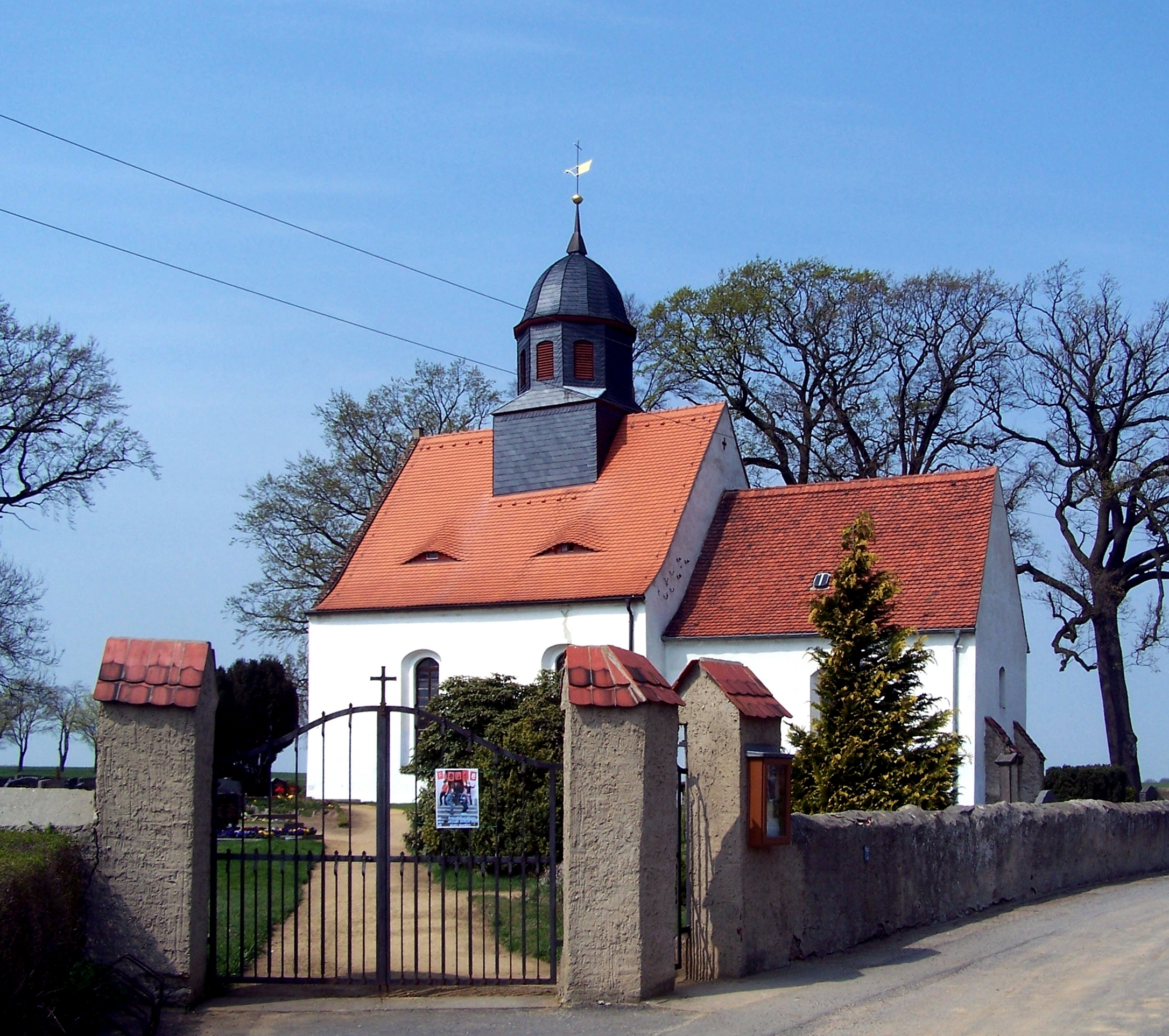 Dorfkirche von Steinbach, Gemeinde Moritzburg, Sachsen